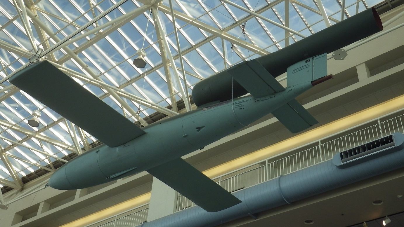 Fieseler Fi103 V-1 Museum of Flight 2015年4月9日撮影